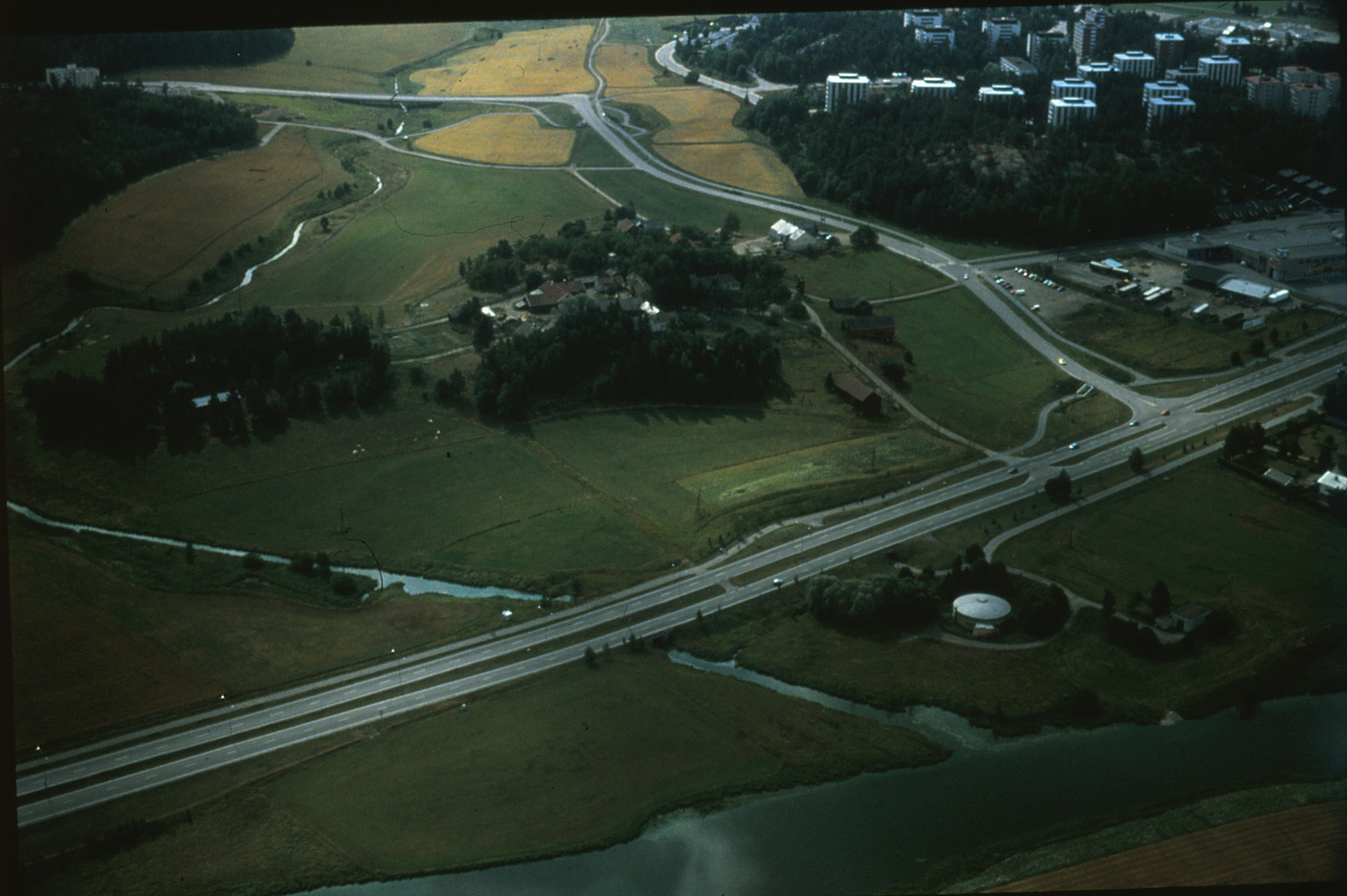 Kuralan Kylämäki pohjoisesta. Jaaninoja laskee Aurajokeen etuoikealla ja Jaaninojan ylittää Hämeen valtatie (valtatie 10).